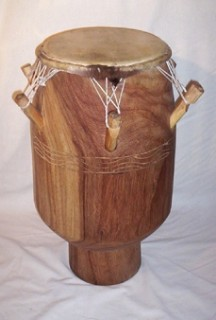 Bild einer Oprente Trommel aus Ghana mit Pflockbespannung. Tweneboa Holz und Antilopenfell.